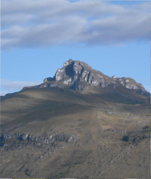 cerro de cumullca cerro encantado